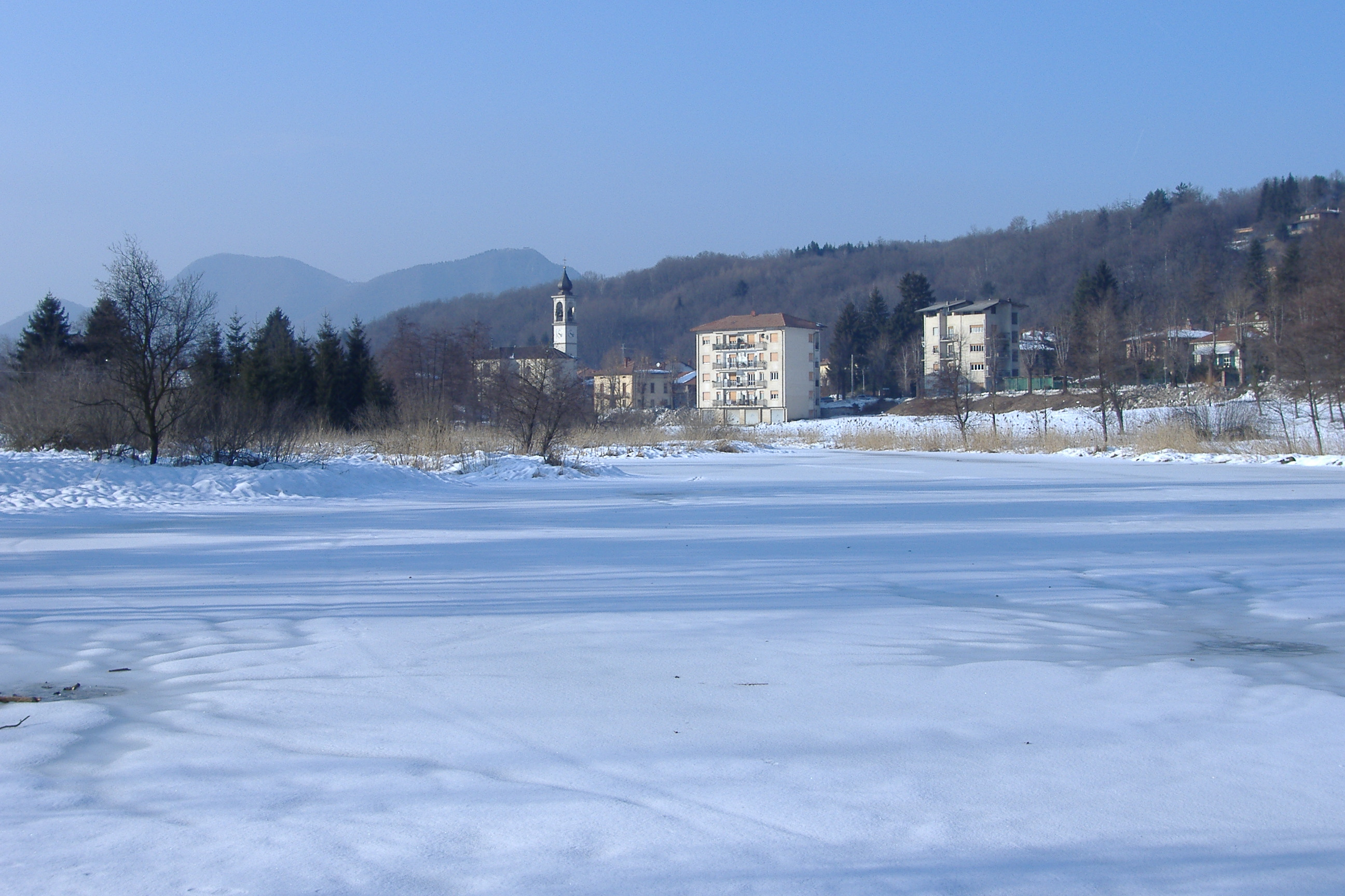 Brinzio visto dal lago ghiacciato.